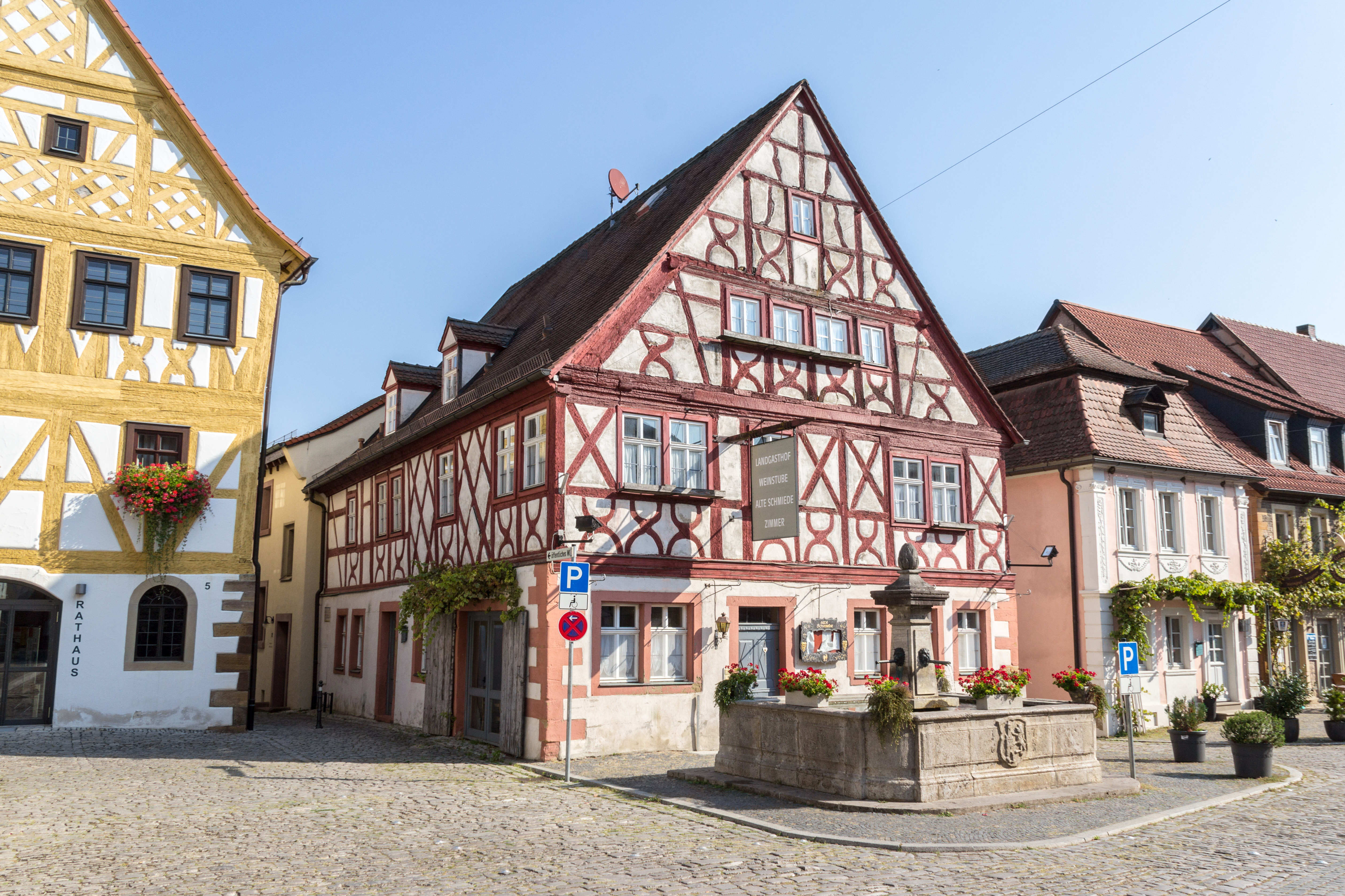 Prichsenstadt, Gasthaus Alte Schmiede, Karlsplatz 7This is a photograph of an architectural monument.